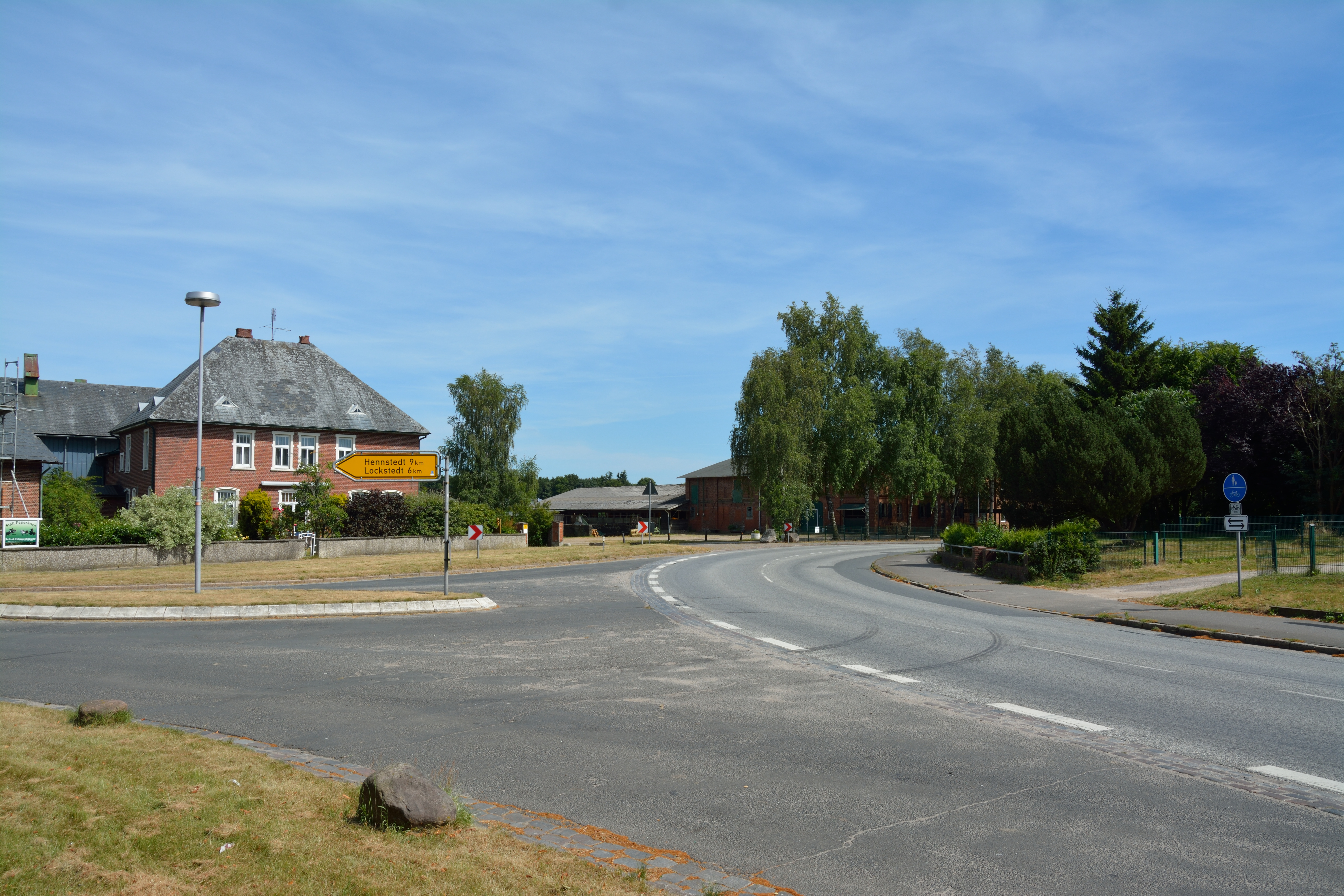 Mühlenbarbek, an der Bundesstrasse 206, die hier den Straßennamen "Johann-Hinrich-Fehrs-Straße" trägt.